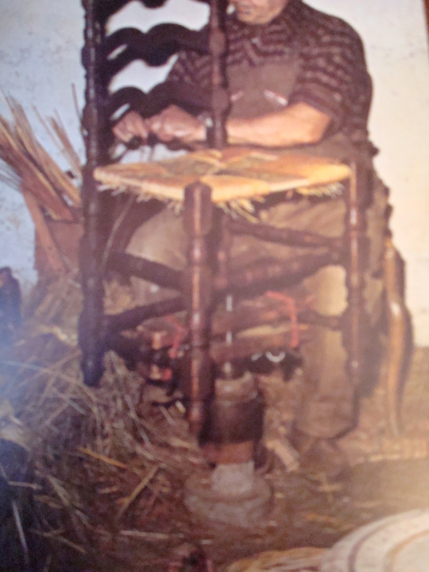 Rempailleur de chaise au travail.